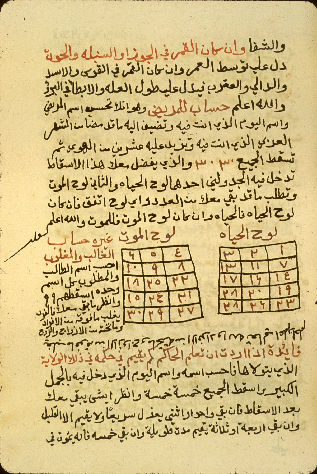 Страница из Китаб Сирр аль-Ашрар